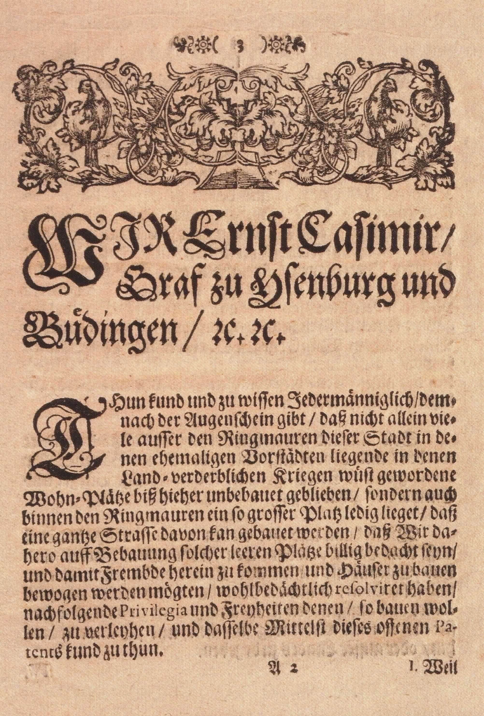 Das Toleranzpatent von 1712